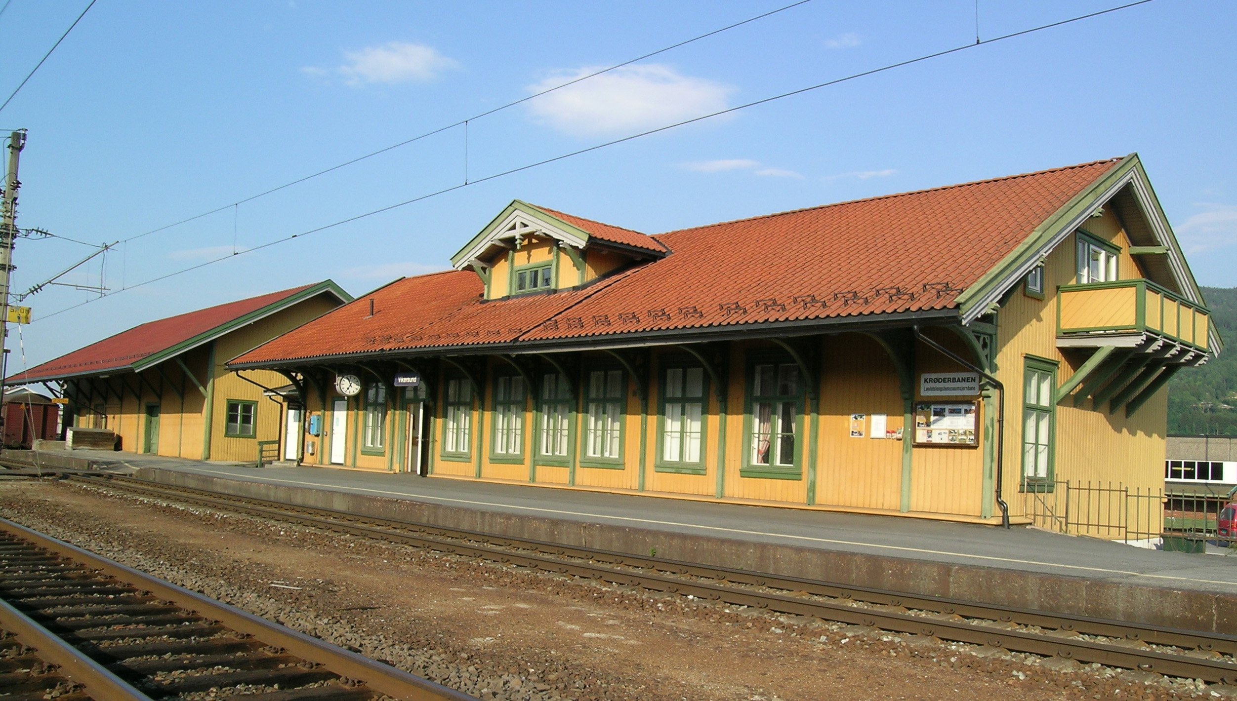 Vikersund station, Randsfjordbanen.